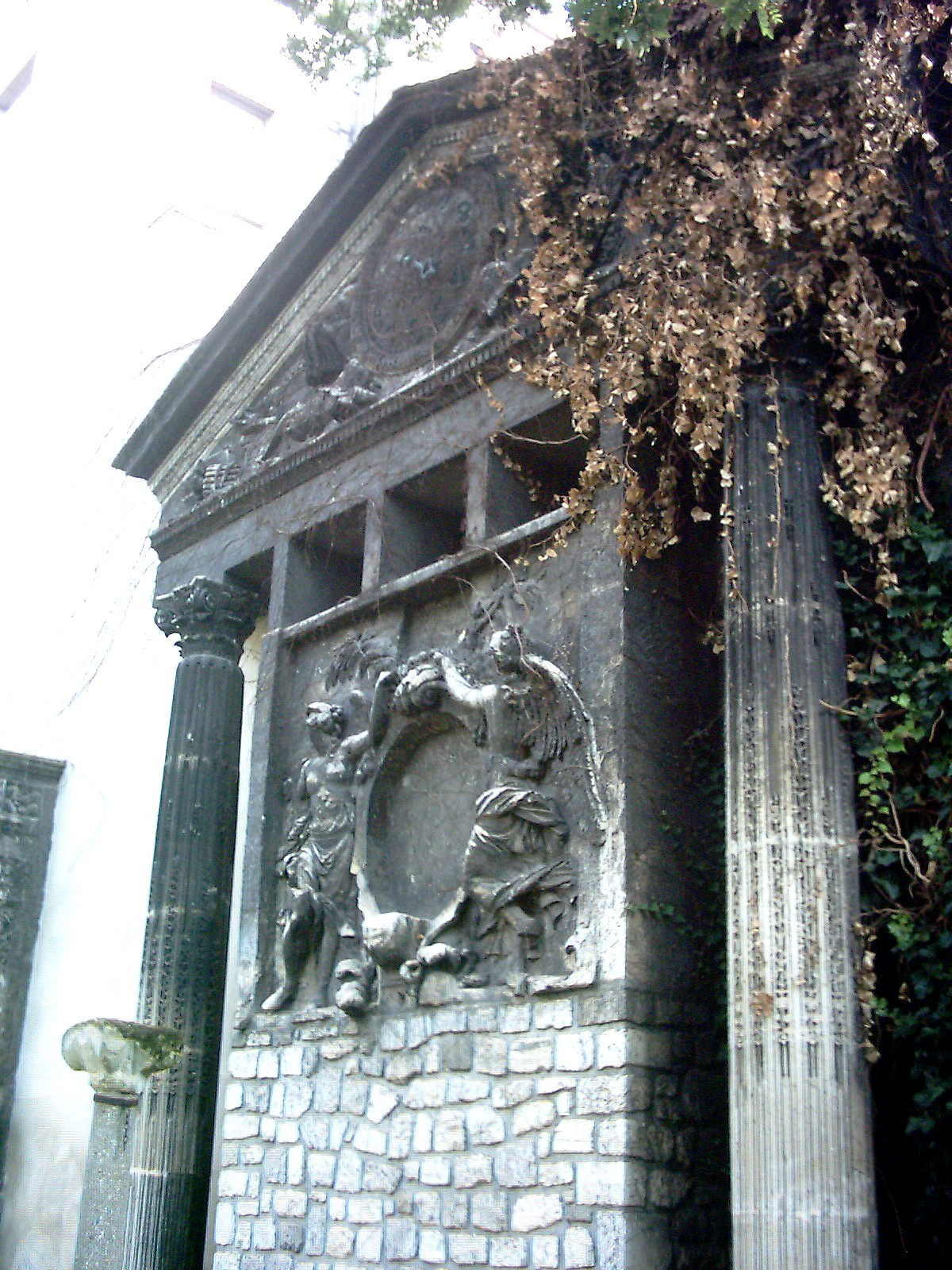 Fronton du palais des Tuileries, avec son horloge. Square Georges Cain, Paris.